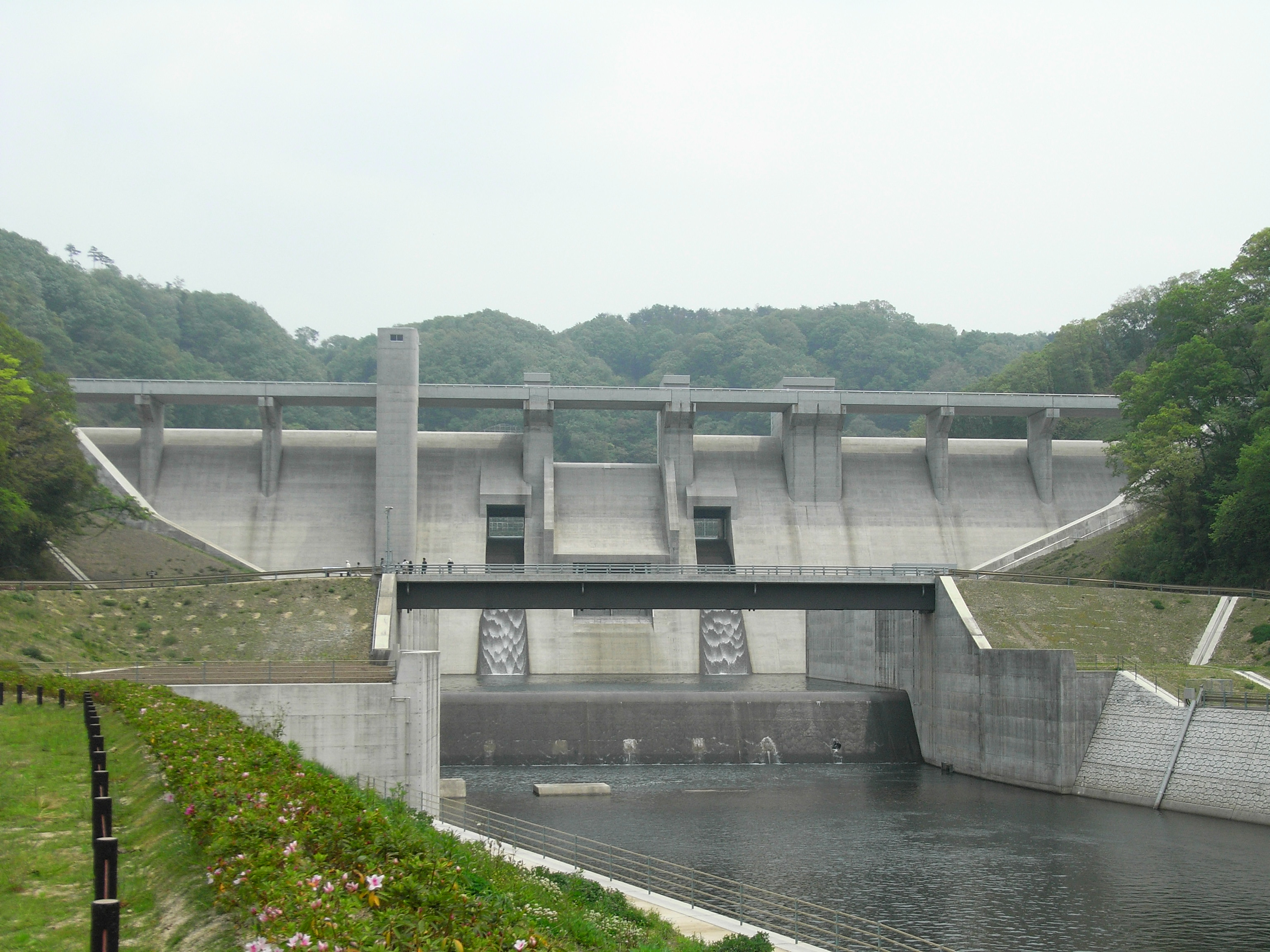 Dam